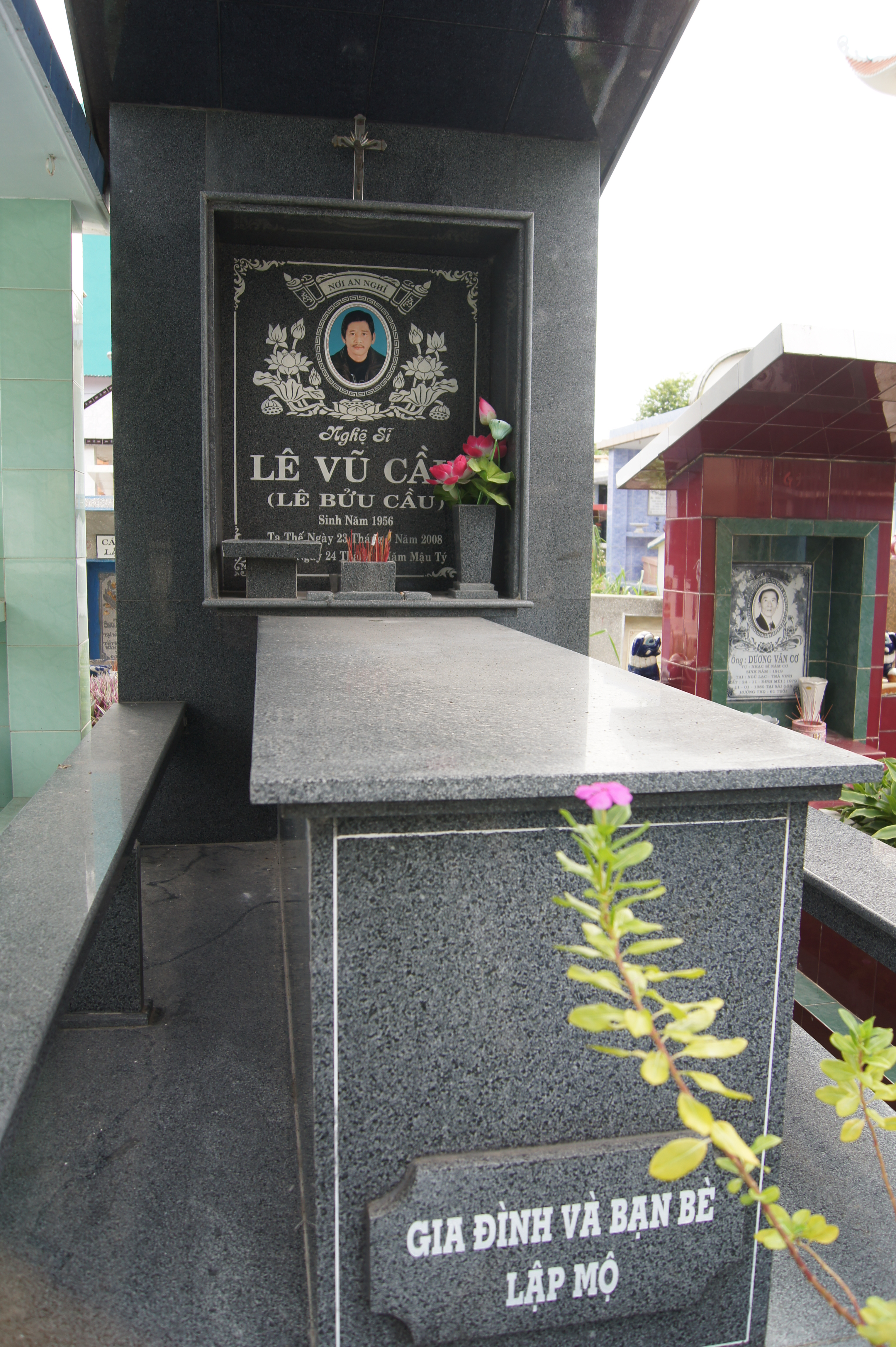 Mộ Nghệ sĩ Lê Vũ Cầu